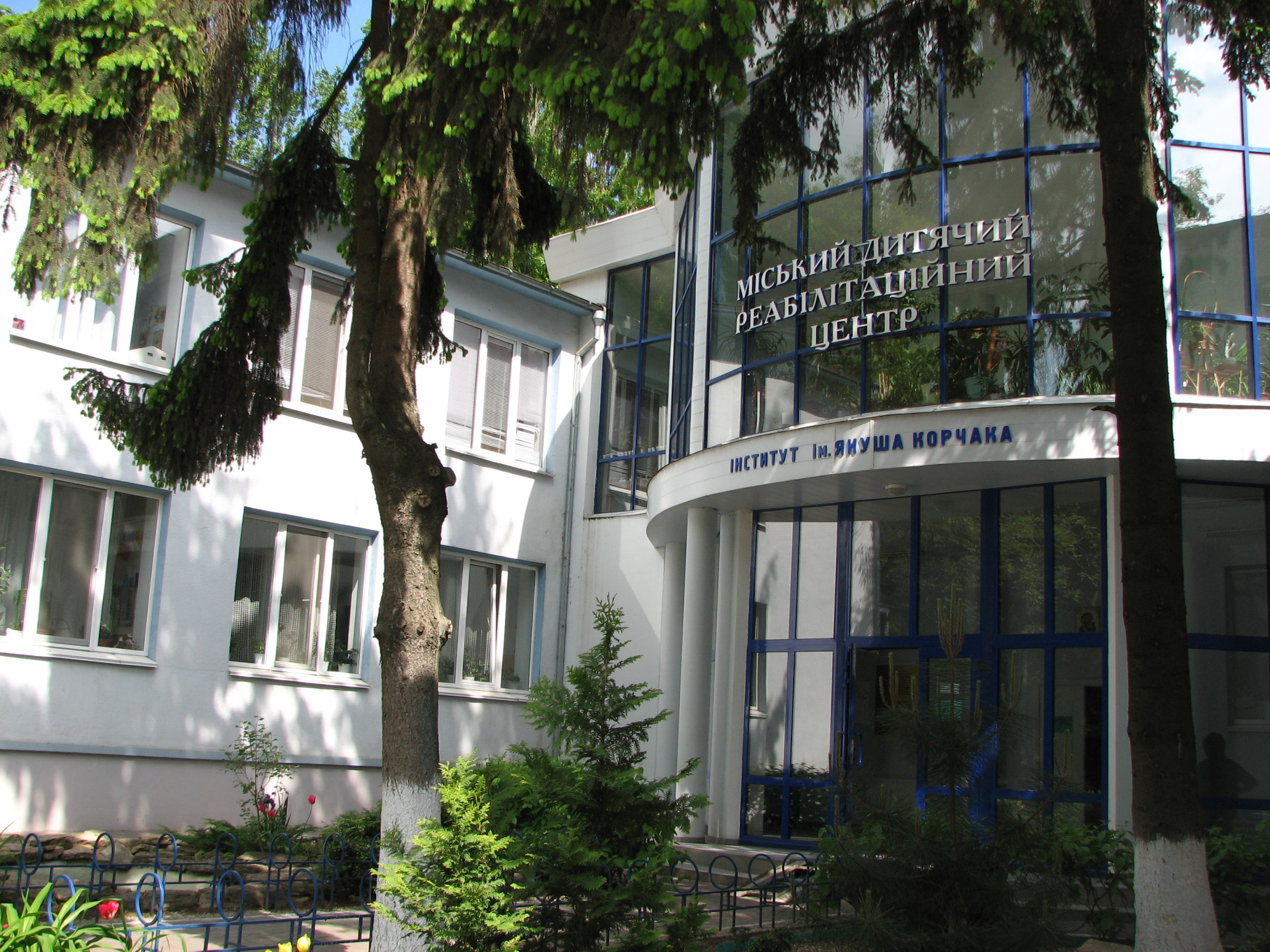 Русиньскый: Фасад